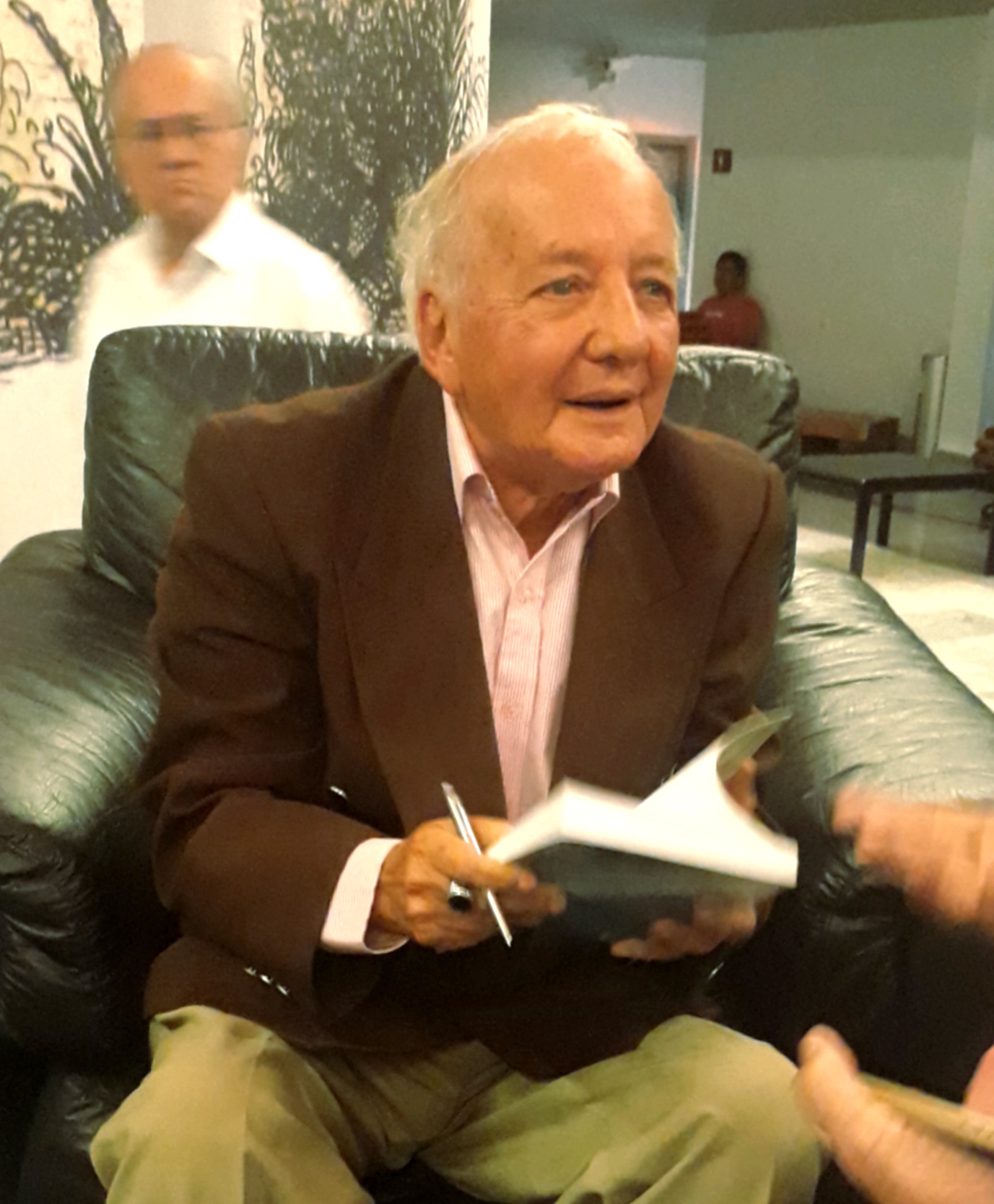 Fernanco Cazón Vera durante conversatorio en Guayaquil (29 de agosto de 2018)